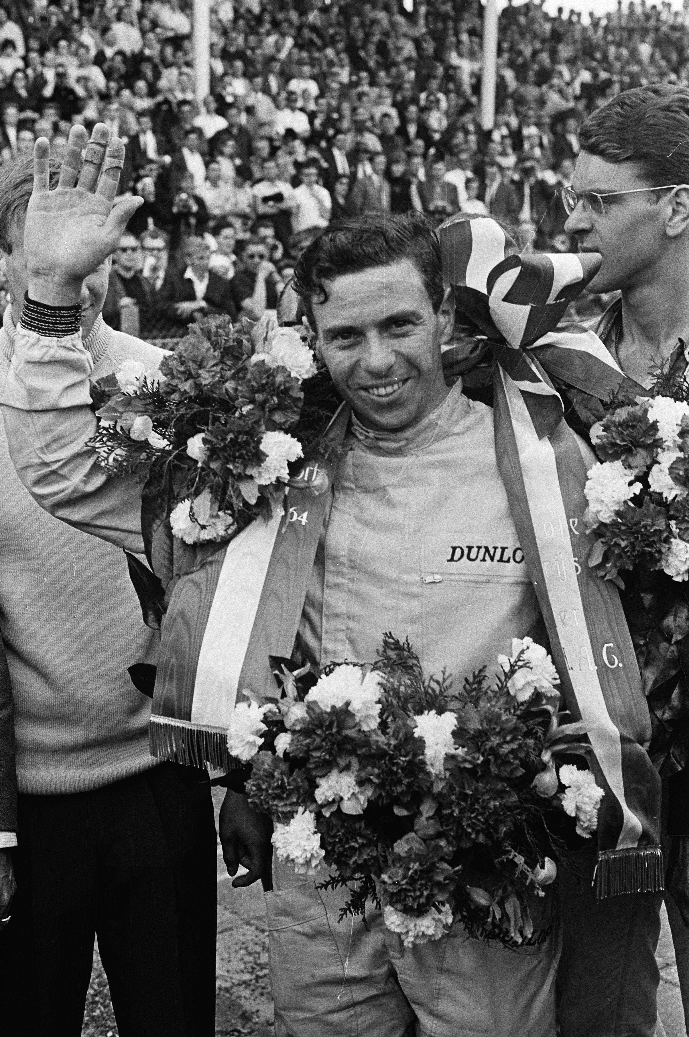 Grand Prix van Nederland, het rennersveld Jim Clark met de krans tijdens de huldiging.